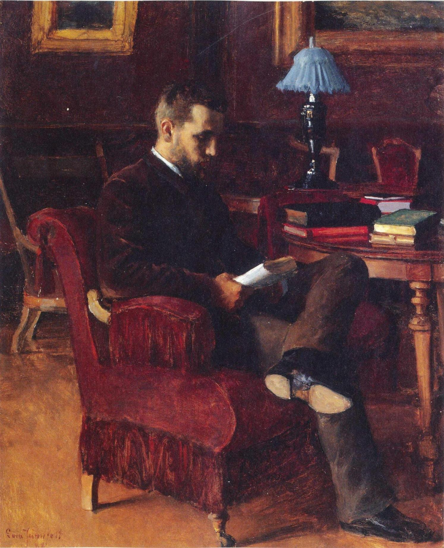 Eero Järnefeltin maalaama muotokuva veljestään, kirjailija Arvid Järnefeltistä. Kuuluu yksityiskokoelmaan.